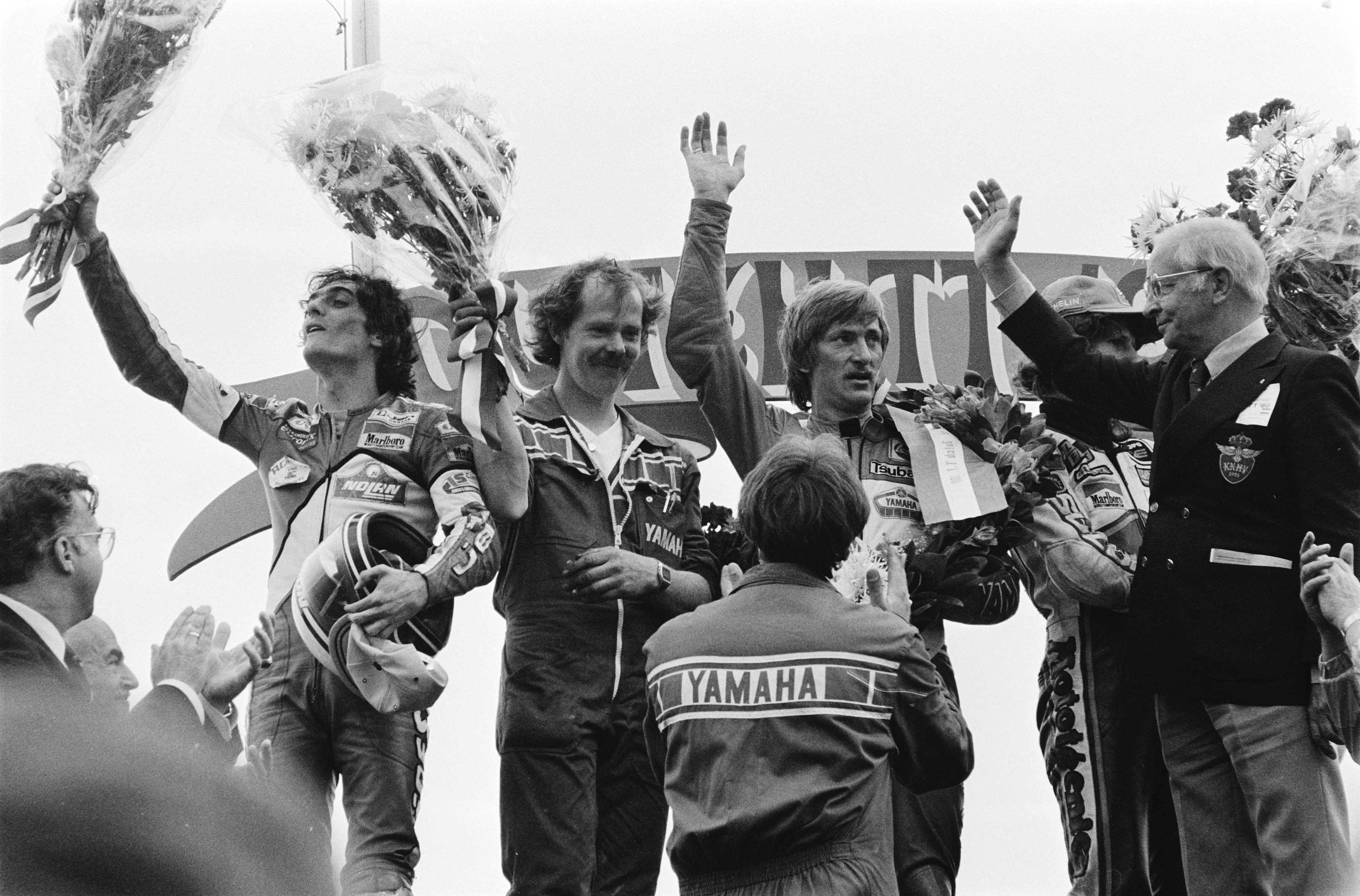 Collectie / Archief : Fotocollectie Anefo Reportage / Serie : TT Assen 1980 Beschrijving : TT Assen ;Huldiging 500 cc. V.l.n.r. Franco Uncini (3e), Adri v.d. Broeke (monteur van Middelburg), Jack Middelburg (winnaar), Graziano Rossi (2e). Datum : 28 juni 1980 Locatie : Assen Trefwoorden : huldigingen, motorcoureurs, motorfietsen, motorraces, motorsport, sport Persoonsnaam : Middelburg, Jack, Rossi, Graziano, Uncini, Franco Fotograaf : Pereira, Fernando / Anefo Auteursrechthebbende : Nationaal Archief Materiaalsoort : Negatief (zwart/wit) Nummer archiefinventaris : bekijk toegang 2.24.01.05 Bestanddeelnummer : 930-9041